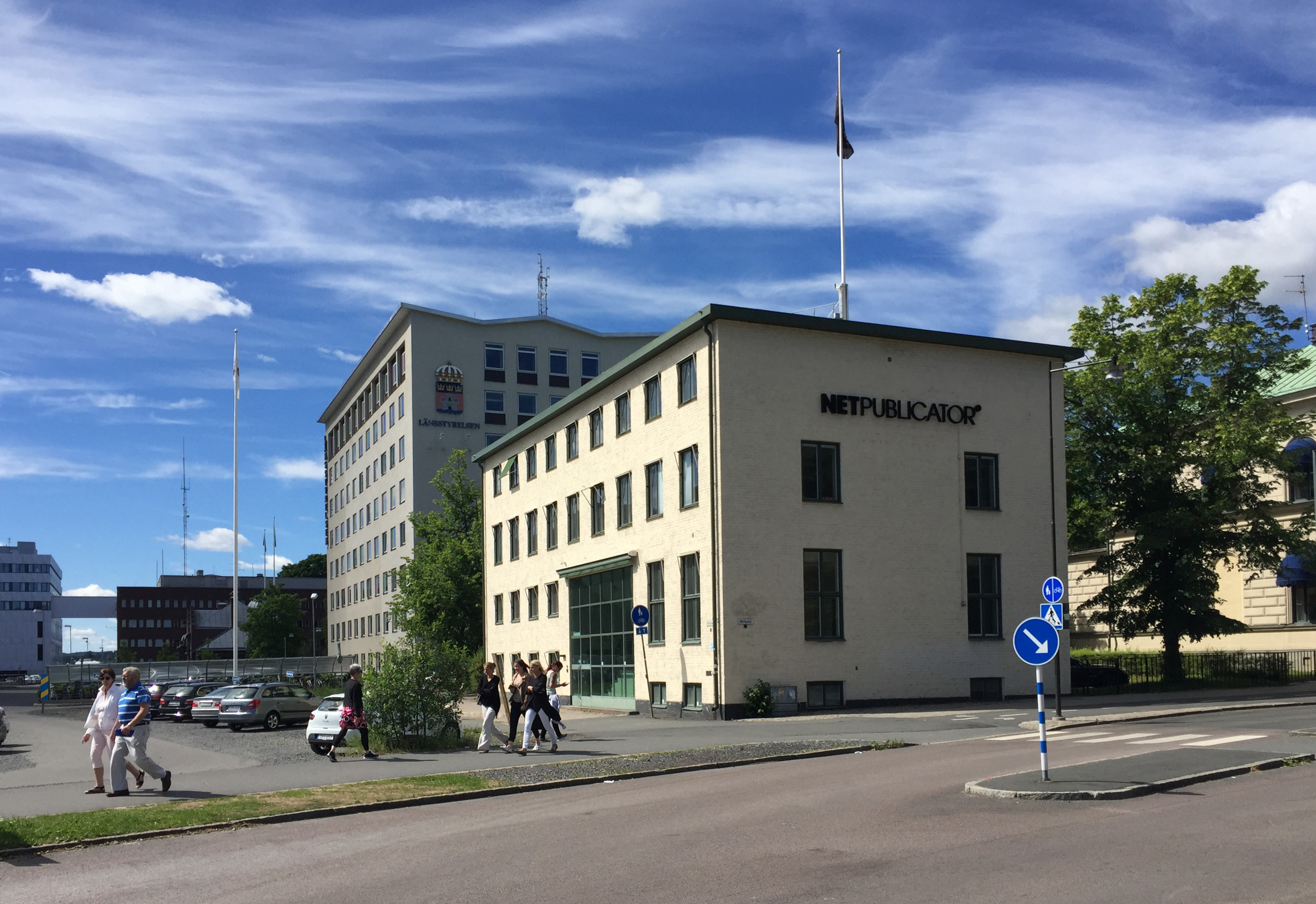 F.d. Lantmäterikontoret, Hamngatan 2 Jönköping. Byggnadsår 1935. Arkitekt Malte Erichs